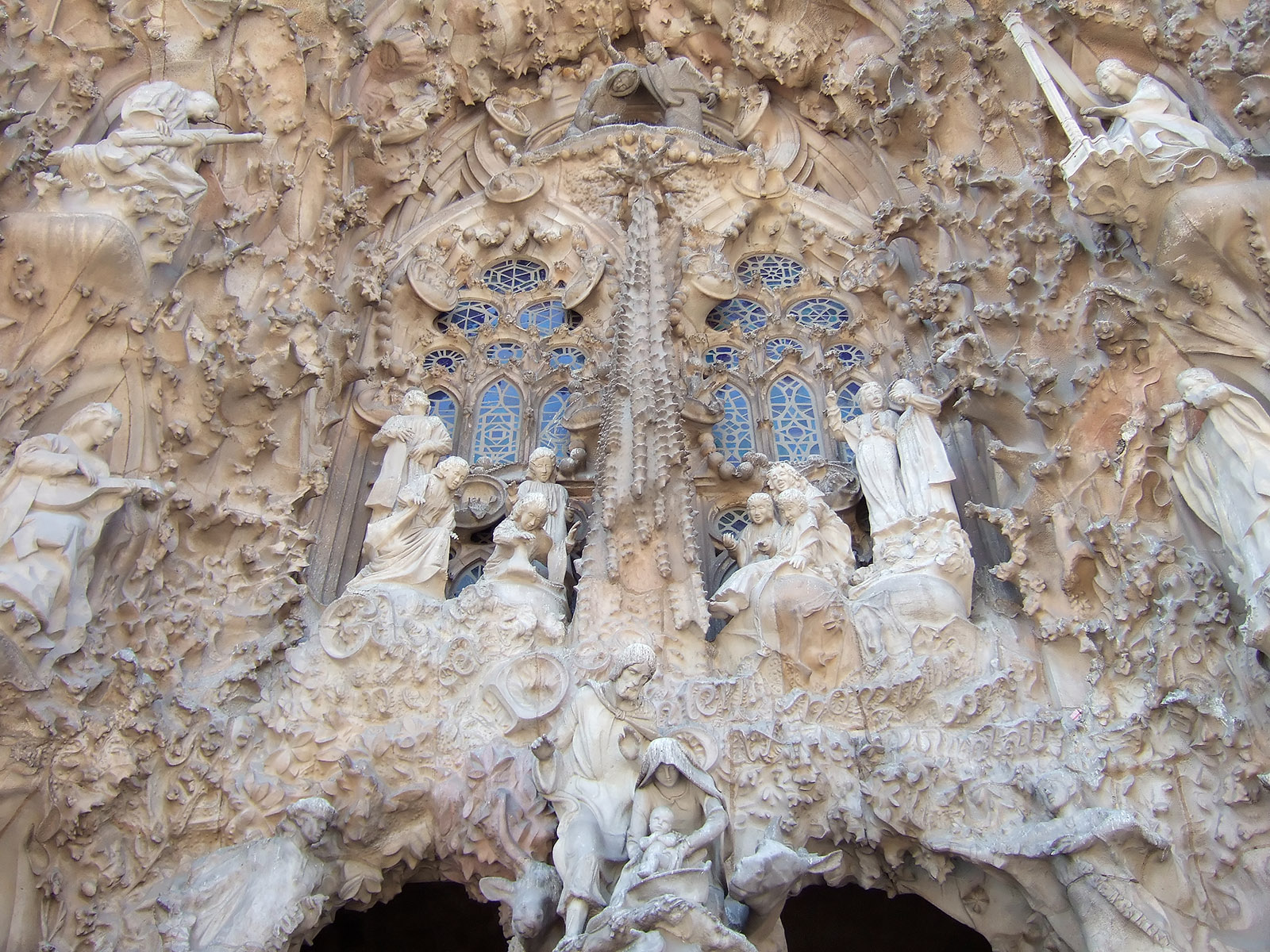 Sagrada Familia portal detail. Fuji F11 Camera at ISO 200.